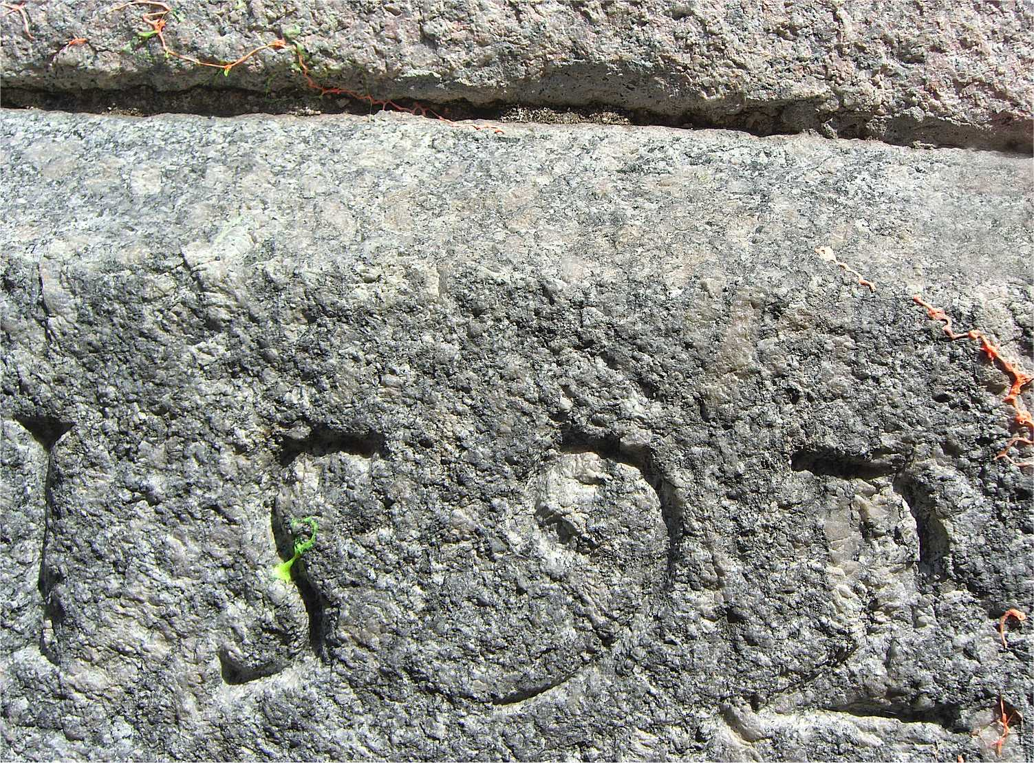 MB Monza - 1592 data inizio costruzione del campanile del Duomo scolpita nello zoccolo del campanile stesso